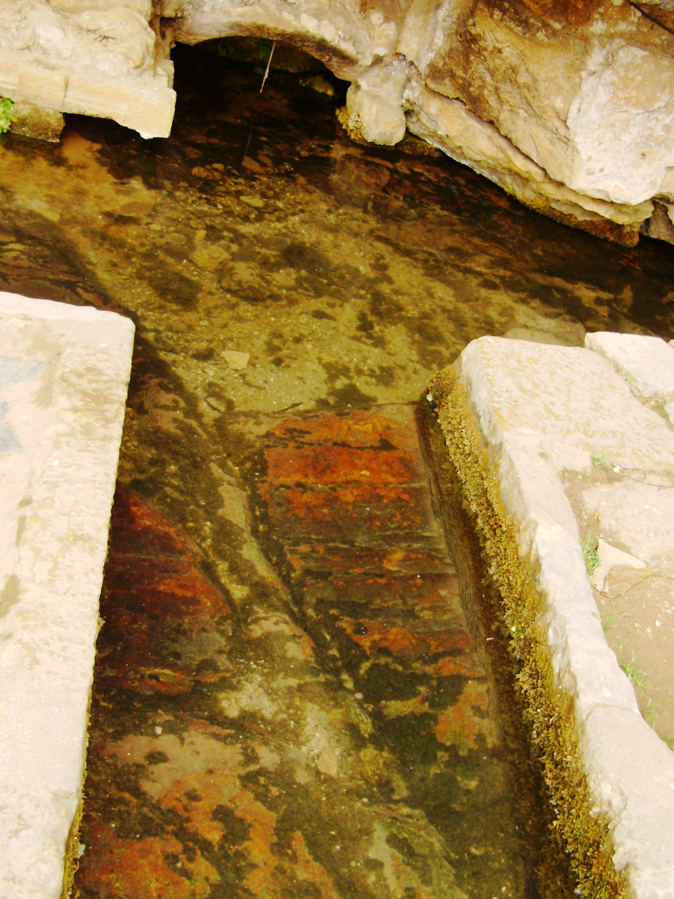 Quinta das Lágrimas, freguesia de Santa Clara, concelho e distrito de Coimbra, Portugal: "Fonte das Lágrimas" (detalhe do lendário "sangue" de D. Inês de Castro).